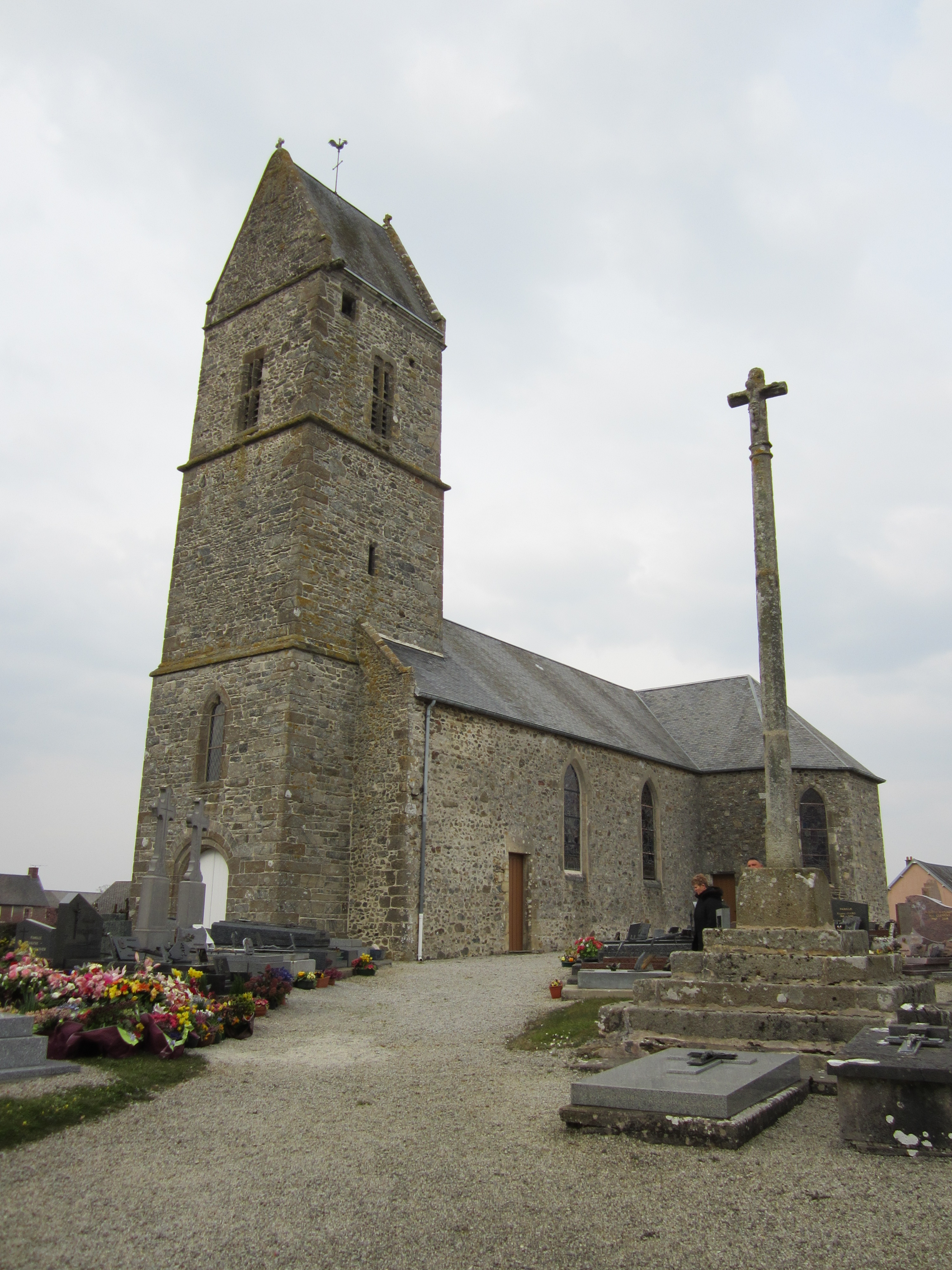 Église Notre-Dame de La Ronde-Haye